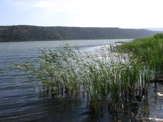 Вид с северного берега Шасского озера, июнь 2011